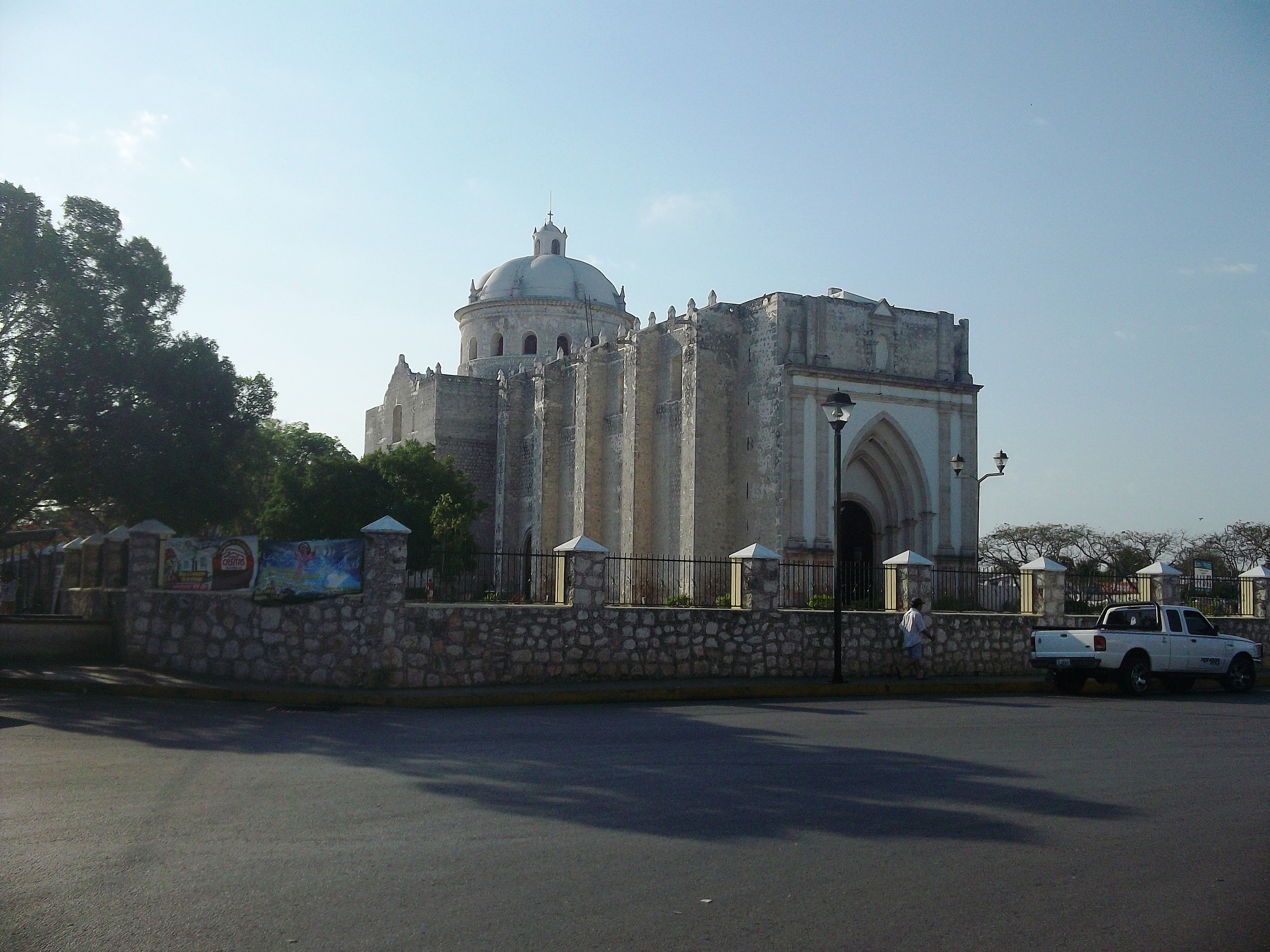 Umán, Yucatán.